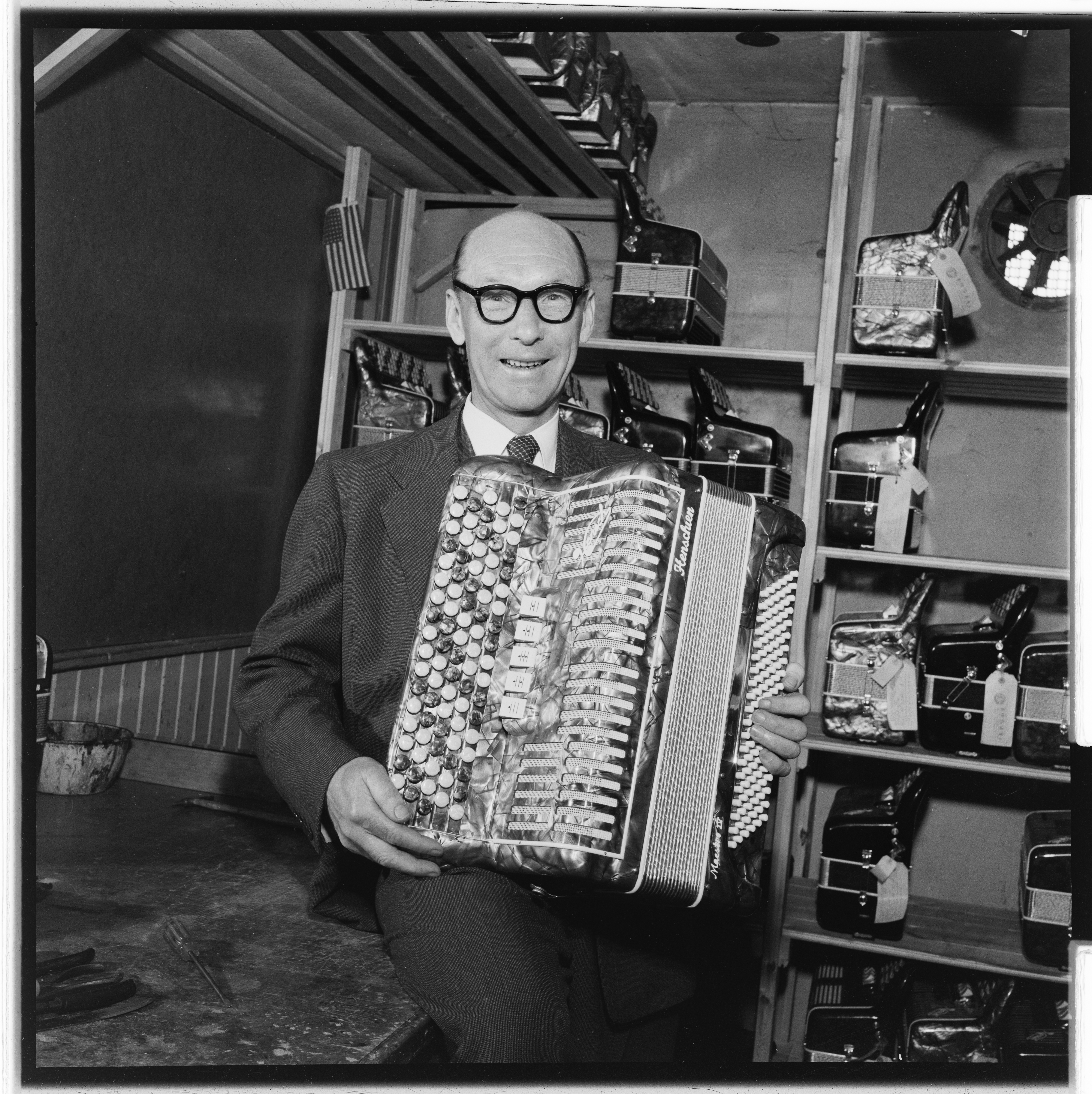 Bildet er hentet fra Arkivverket. Portrett av trekkspiller Harald Henschien, Hønefoss. Arkivinstitusjon : Riksarkivet Arkivnavn : Billedbladet NÅ Sted : Norge, Buskerud, Ringerike, Hønefoss Emneord: Musikere, Trekkspillere, Trekkspill, Menn, Portretter Avbildet: Henschien, Harald